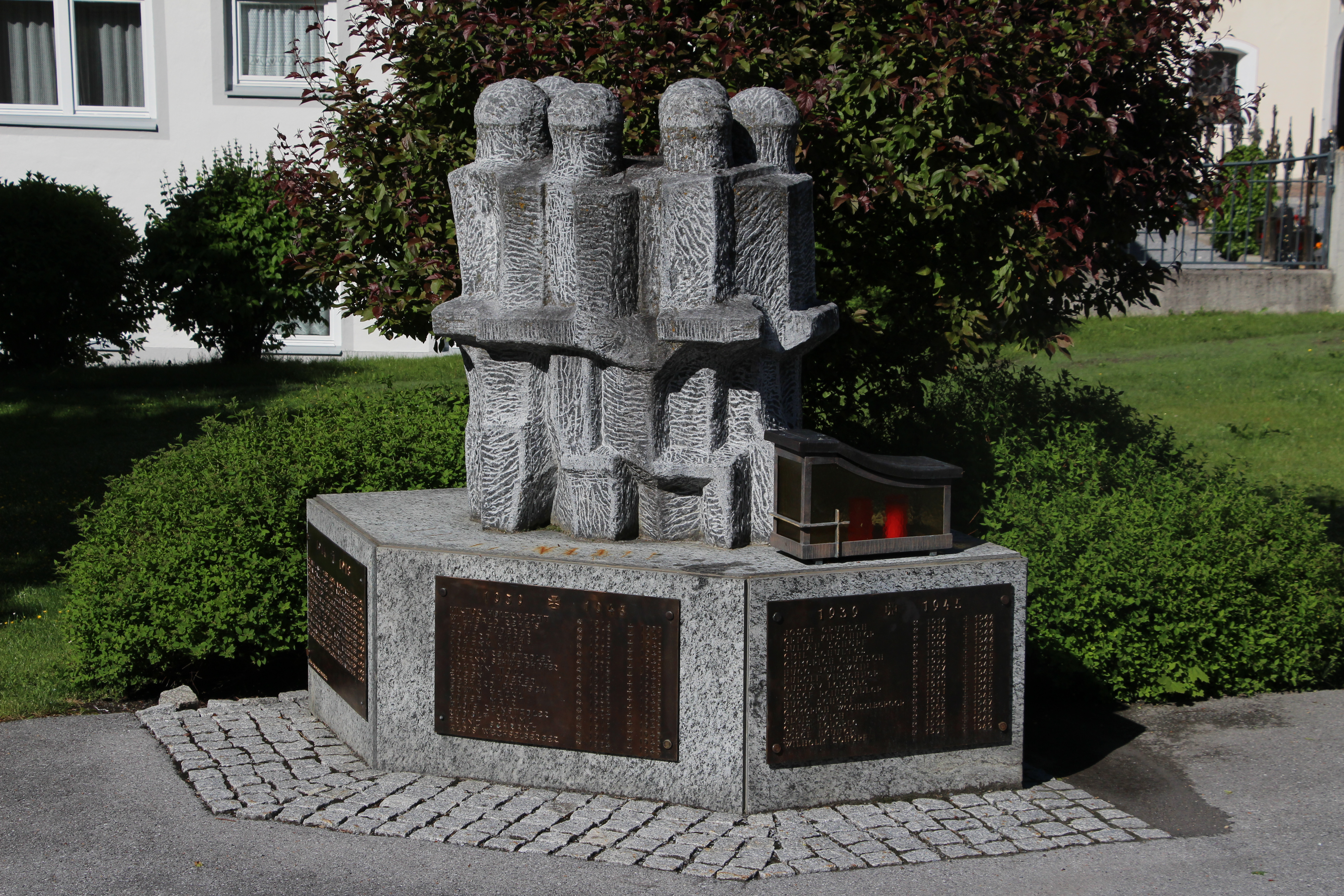 Kriegerdenkmal in Jerzens, ca. 1969 von Elmar Kopp This media shows the remarkable cultural object in the Austrian state of Tyrol listed by the Tyrolean Art Cadastre with the ID 21218.